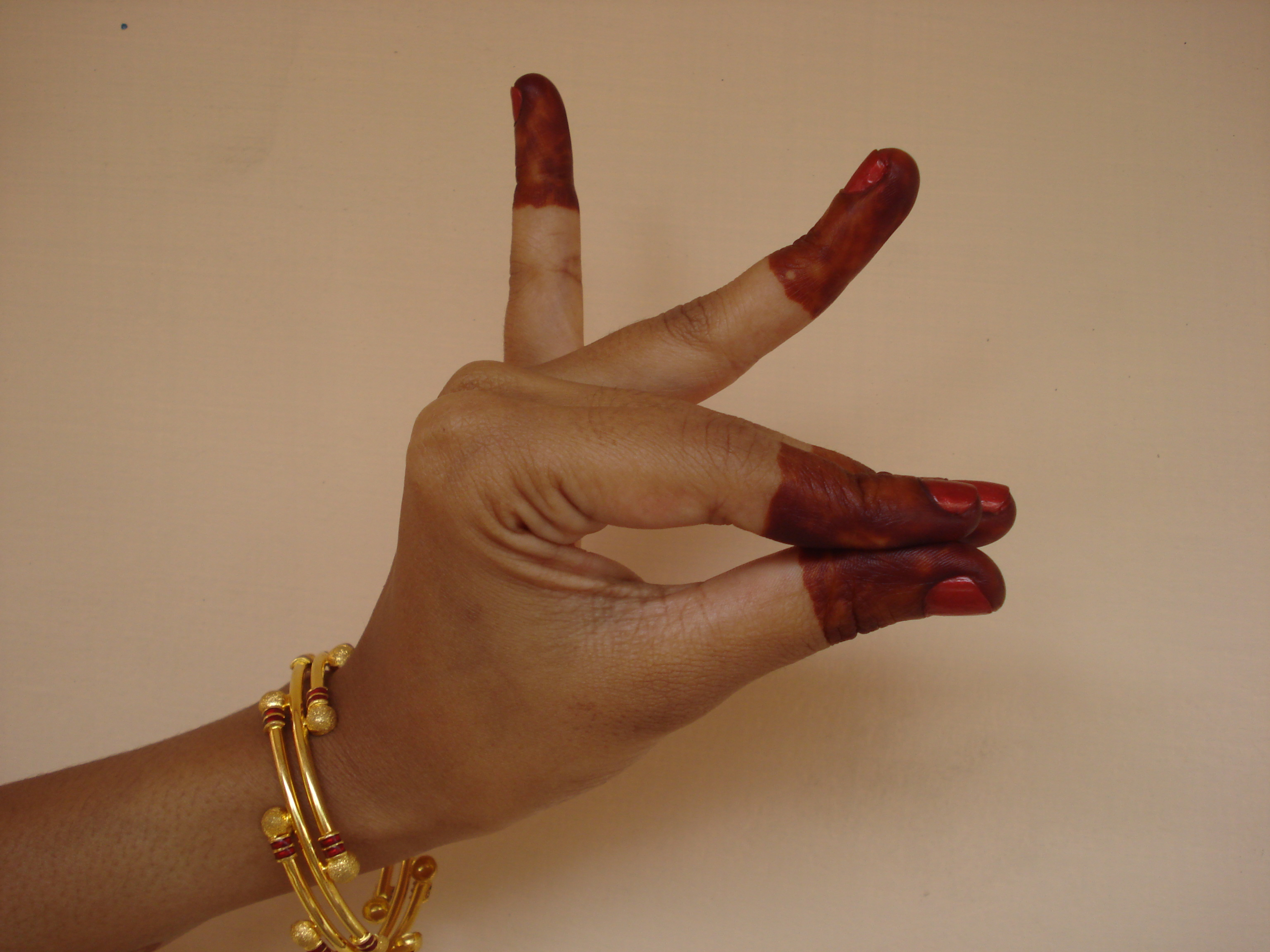 കടകാമുഖഹസ്തം